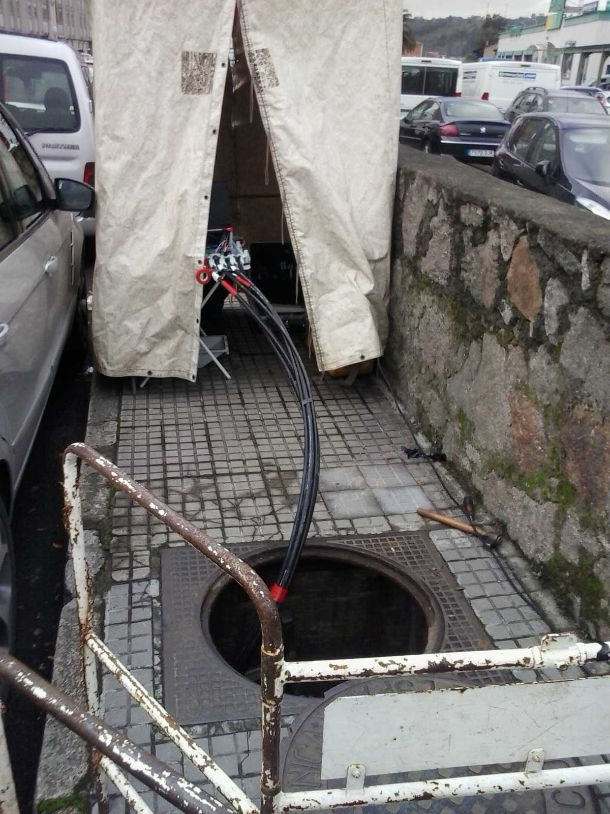 Empalme de fibra óptica de Telefónica, A Coruña